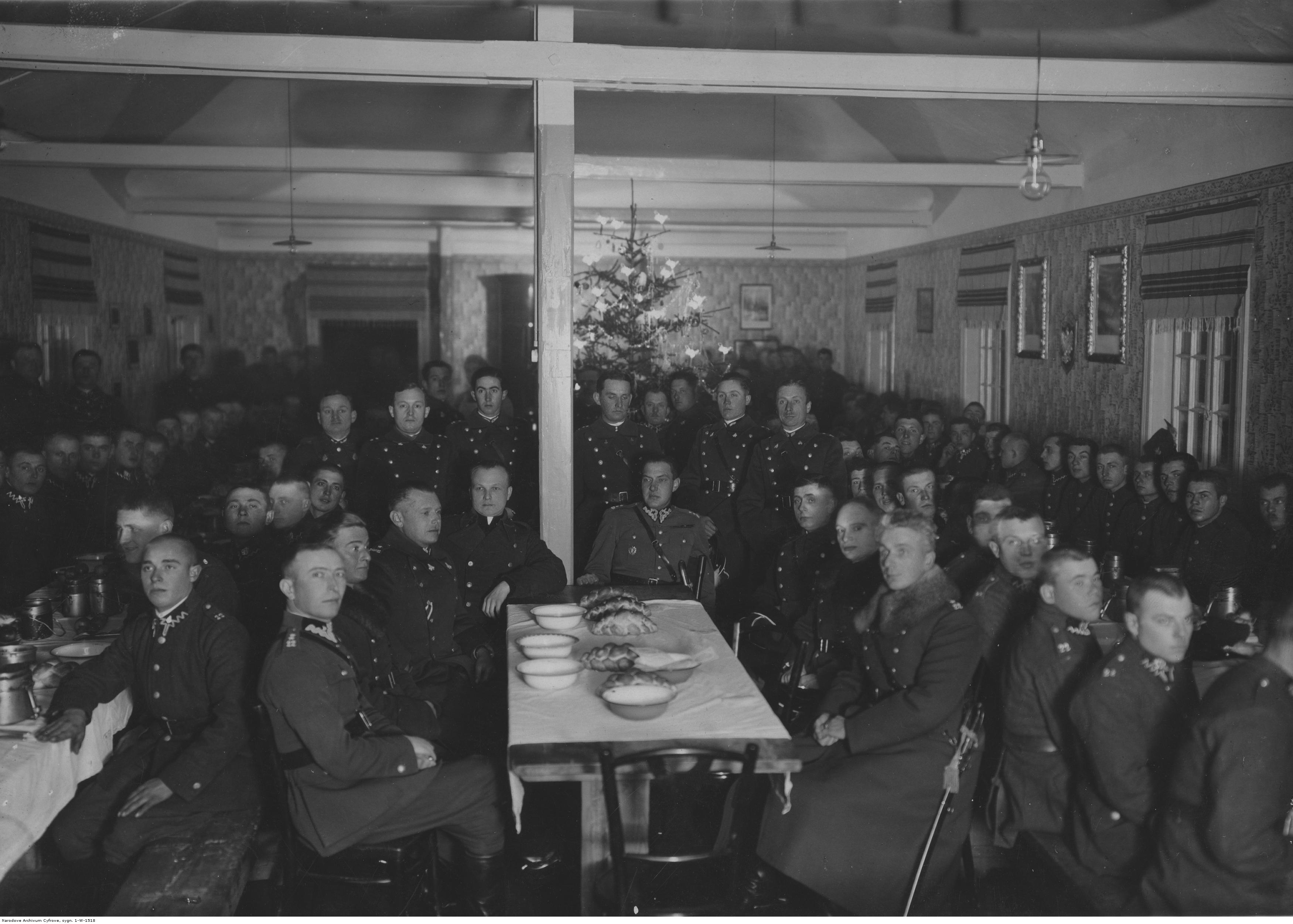 Wieczerza wigilijna dla szeregowych z 22 Pułku Artylerii Lekkiej w Przemyślu - żołnierze przy stołach podczas wieczerzy. Widoczny m.in. dowódca pułku ppłk dypl. Włodzimierz Ludwig. Koncern Ilustrowany Kurier Codzienny - Archiwum Ilustracji. Sygnatura: 1-W-1518